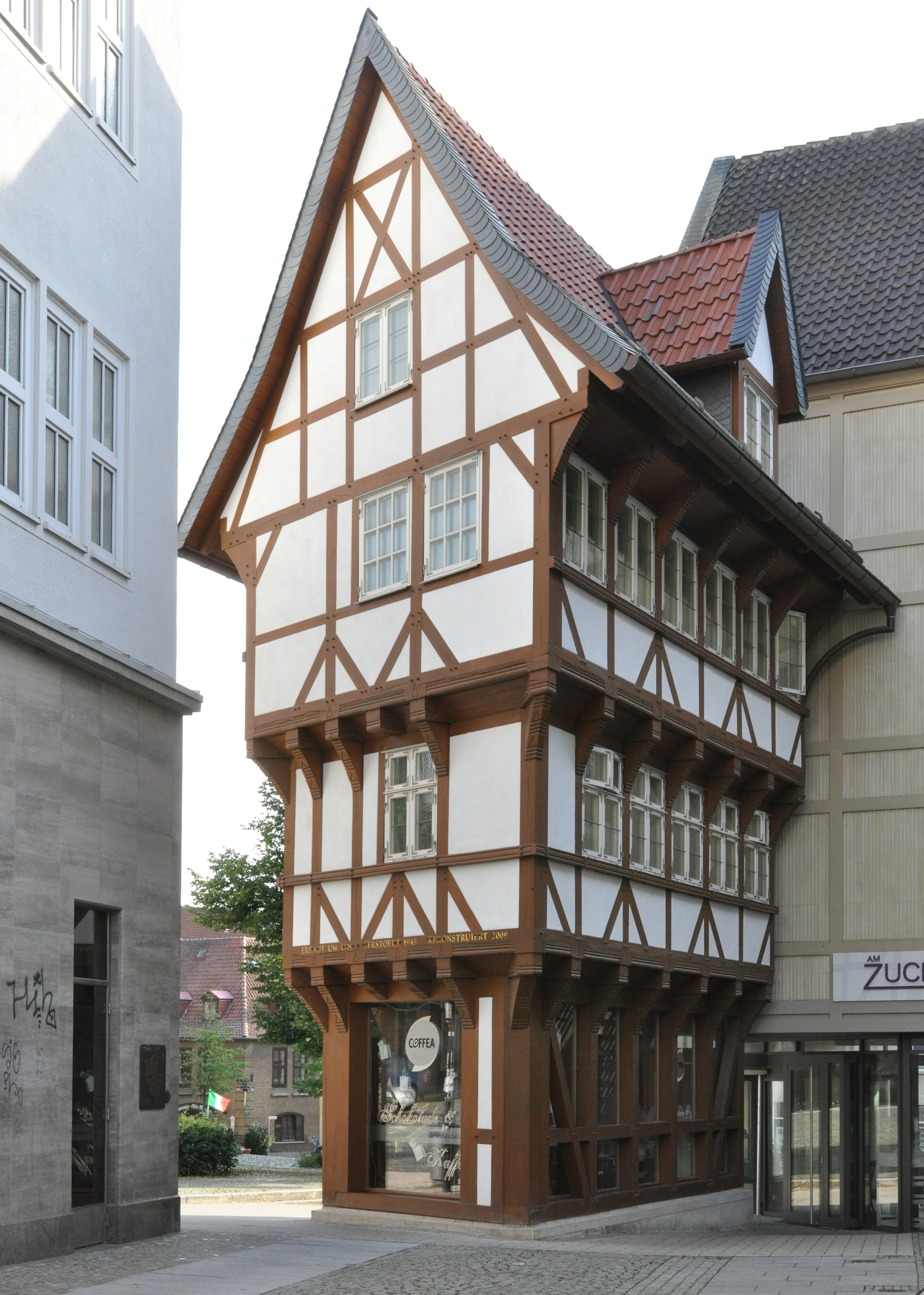 Sogenannter Umgestülpter Zuckerhut, Andreasplatz 29, Fachwerkhaus erbaut um 1510, am 22.3.1945 zerstört, Nov.2009-Okt.2010 rekonstruiert.